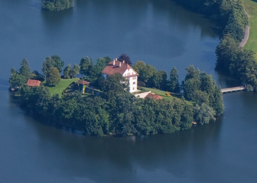 Luftaufnahme von Schloss Mauensee